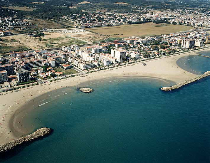 Playas de Cunit Platges de Cunit